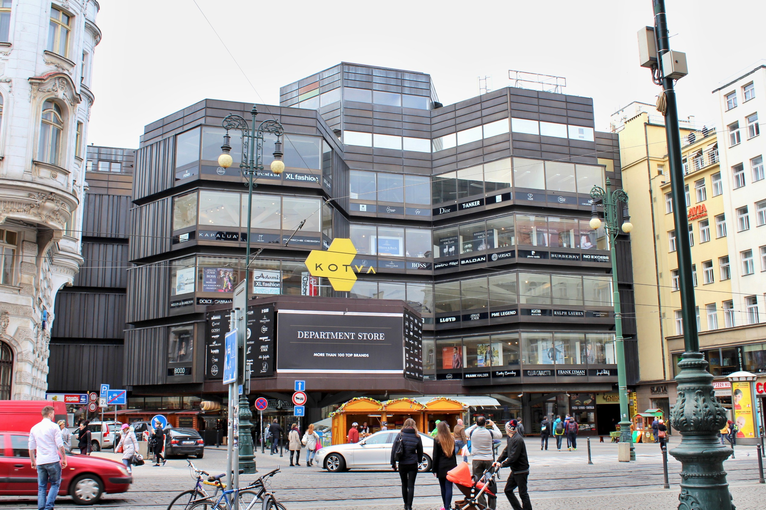 OD Kotva